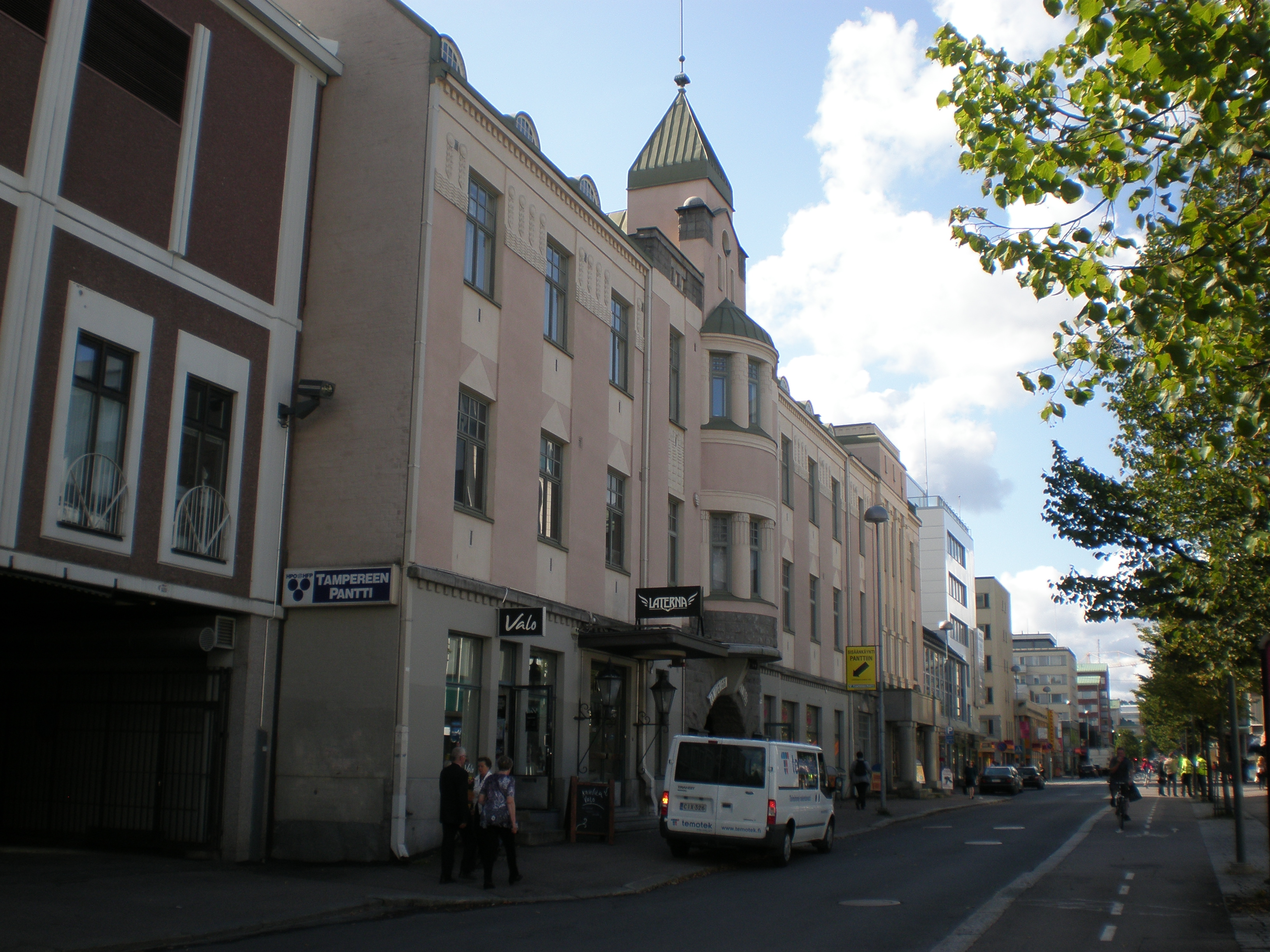 Tampereen Pantin talo